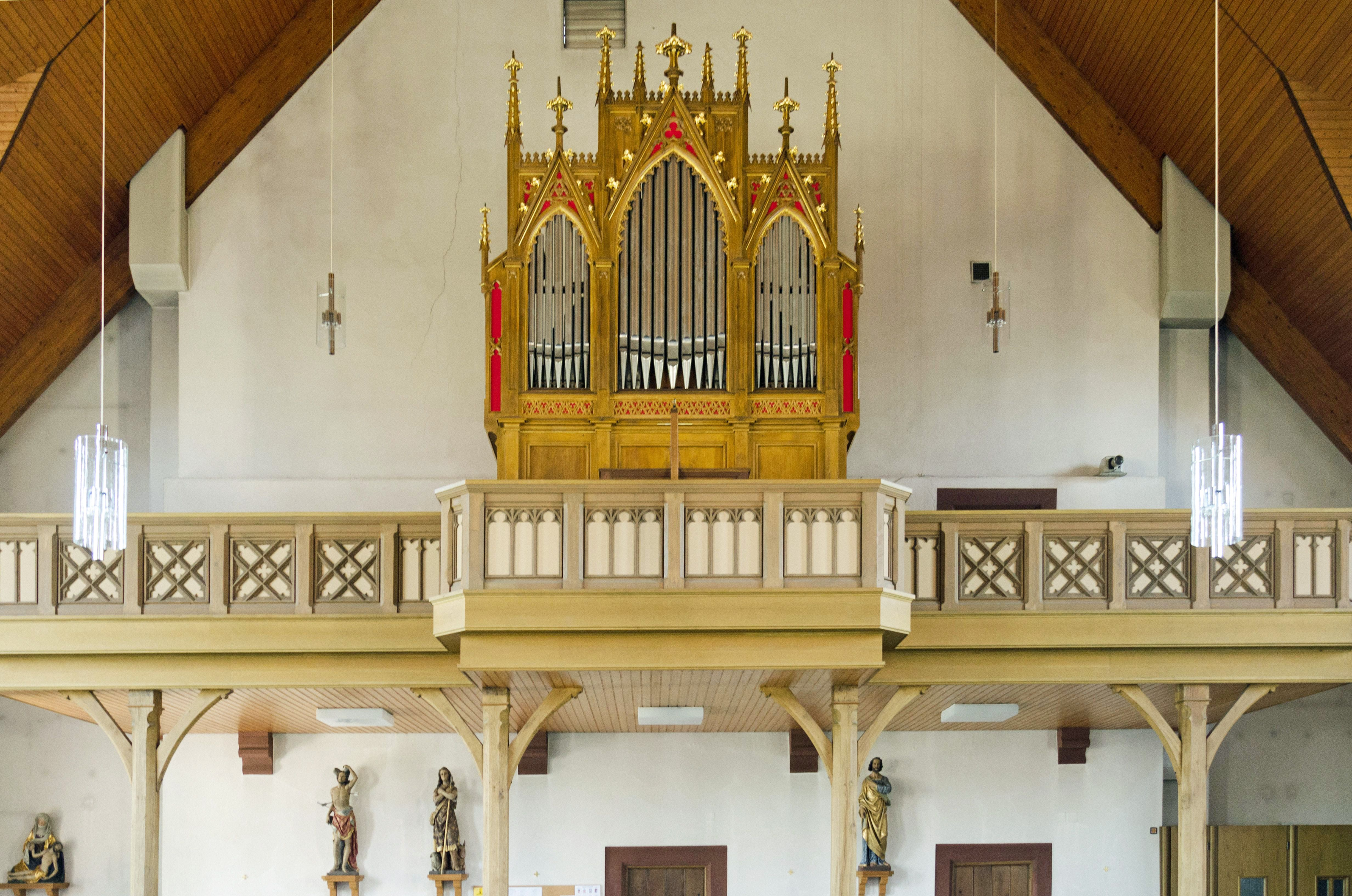 Euerdorf, Katholische Pfarrkirche St Johannes d. Täufer